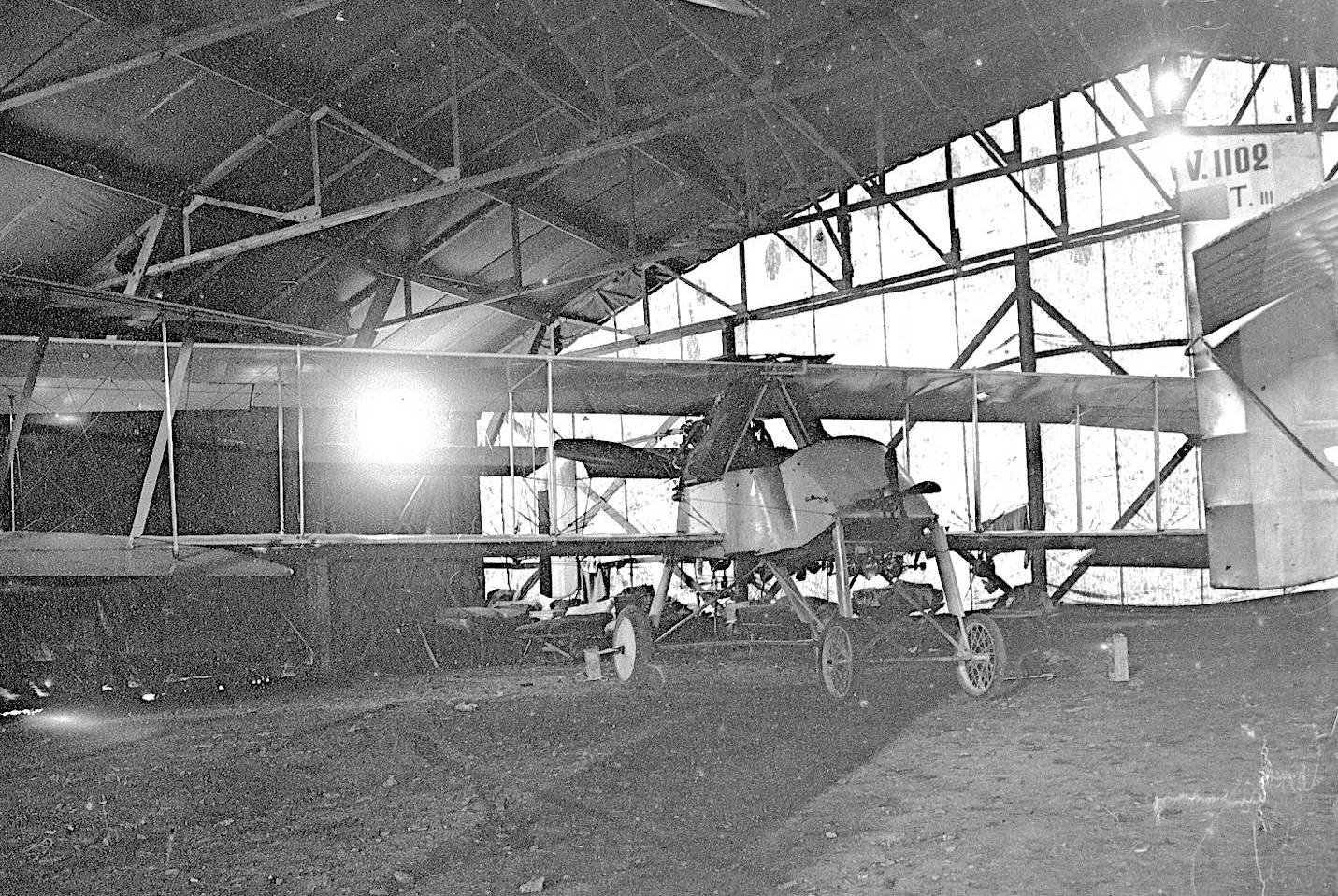 Un avion (Voisin) de l'escadrille V.114 garé dans un hangar à Autrecourt-sur-Aire (Meuse). 1916. Guerre 1914-1918.